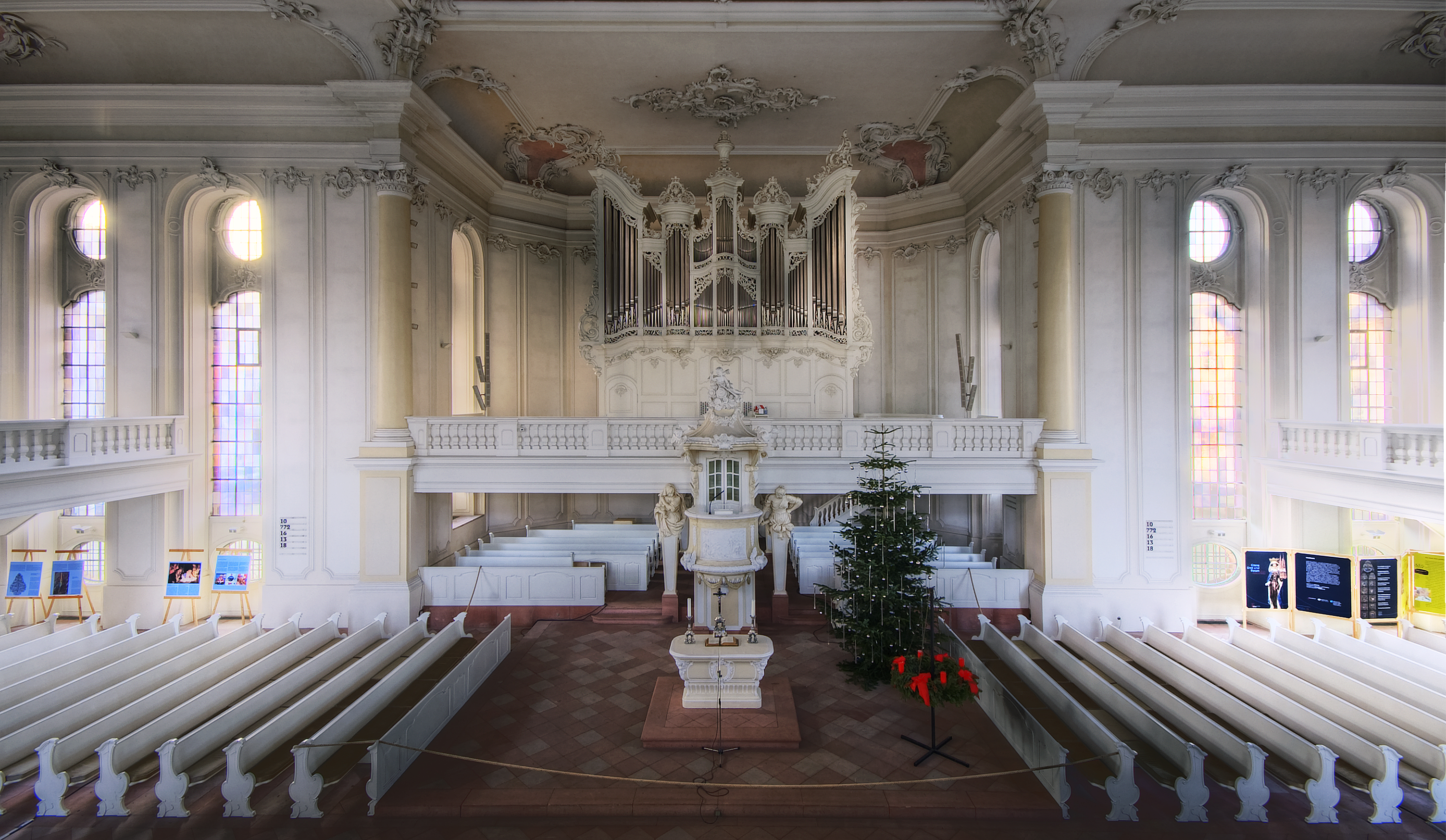 Saarbrücken, Ludwigskirche